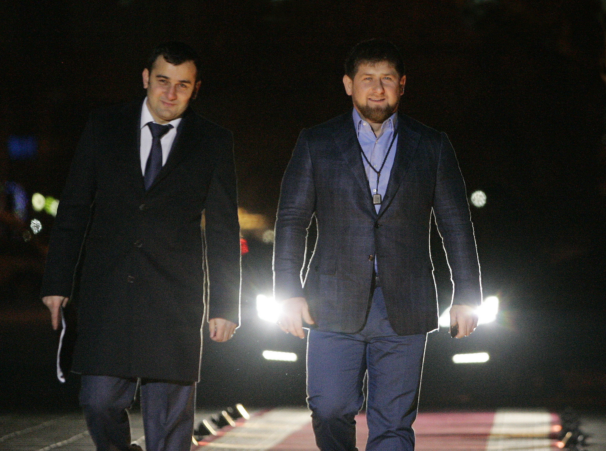 Глава Чеченской Республики Рамзан Кадыров и директор телерадиокомпании "Грозный" Адлан Бачаев. Финал конкурса "Национальная пятерка"